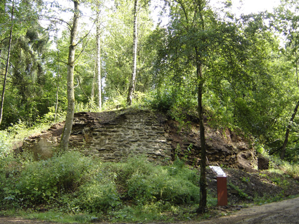 Bremsschapp. Allgemenges zum Bild: Dëst Bild weist de Bremsschapp um Bielesser Gaalgebierg, deen d'Buggien de Bierg erofgeloos huet.